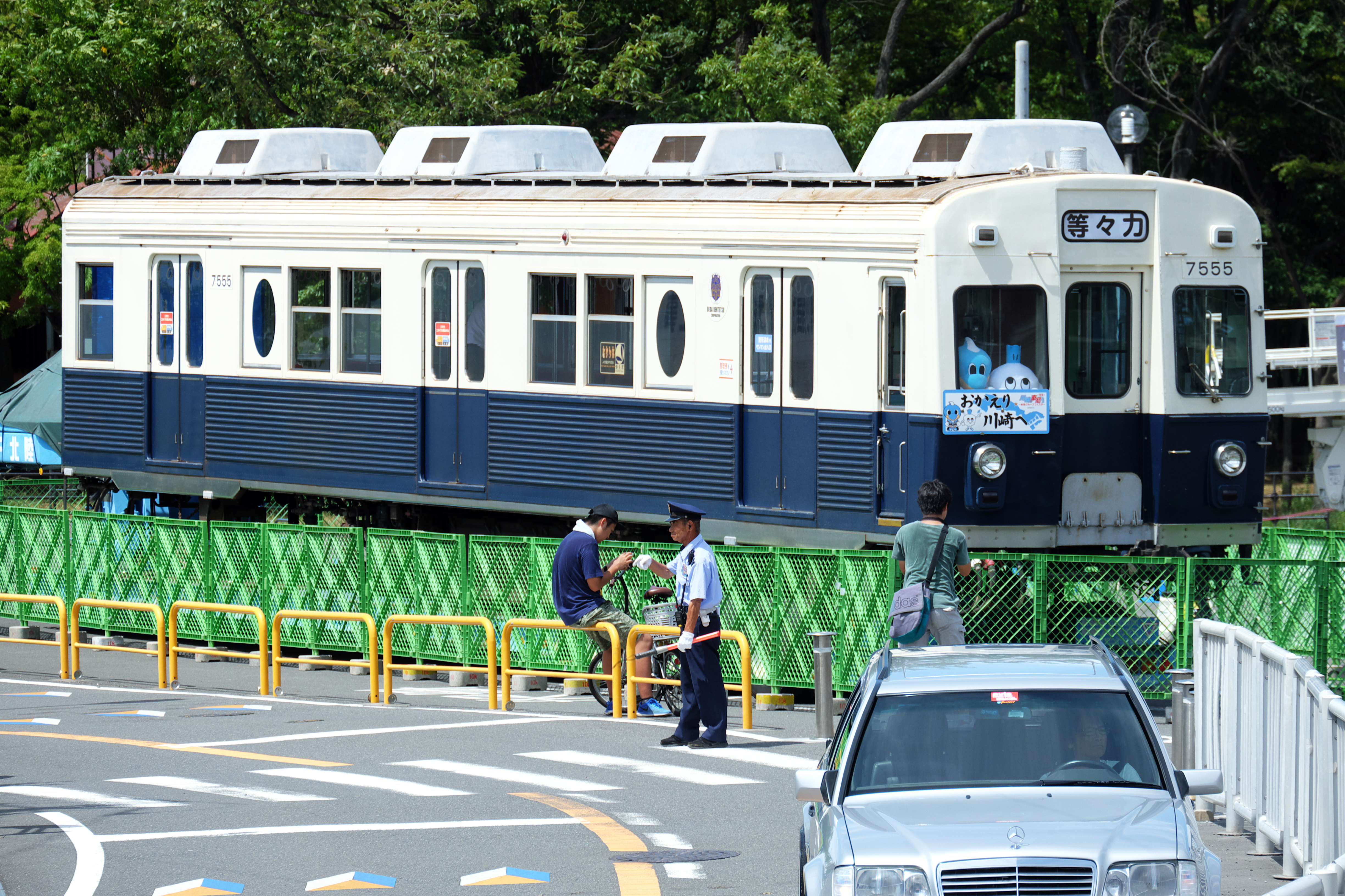 上田電鉄デハ7555号車。廃車後にJリーグ川崎フロンターレの企画として、等々力陸上競技場前で展示された。